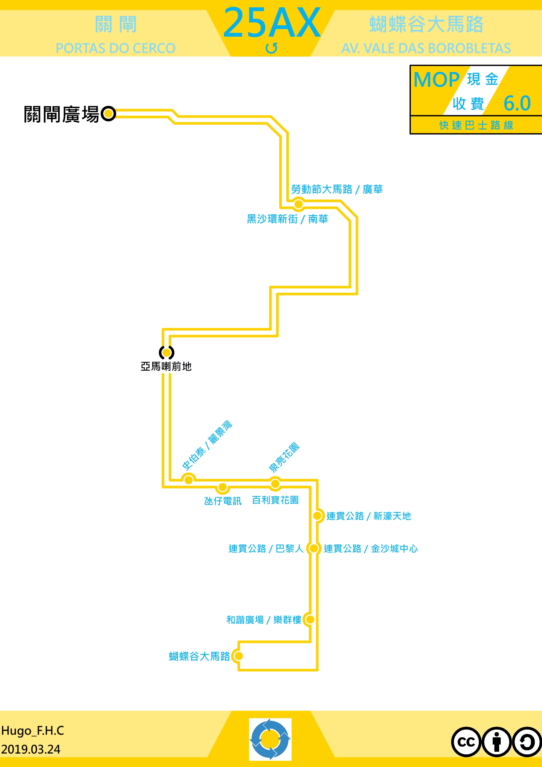 中文（香港）: 澳門巴士25AX走線圖